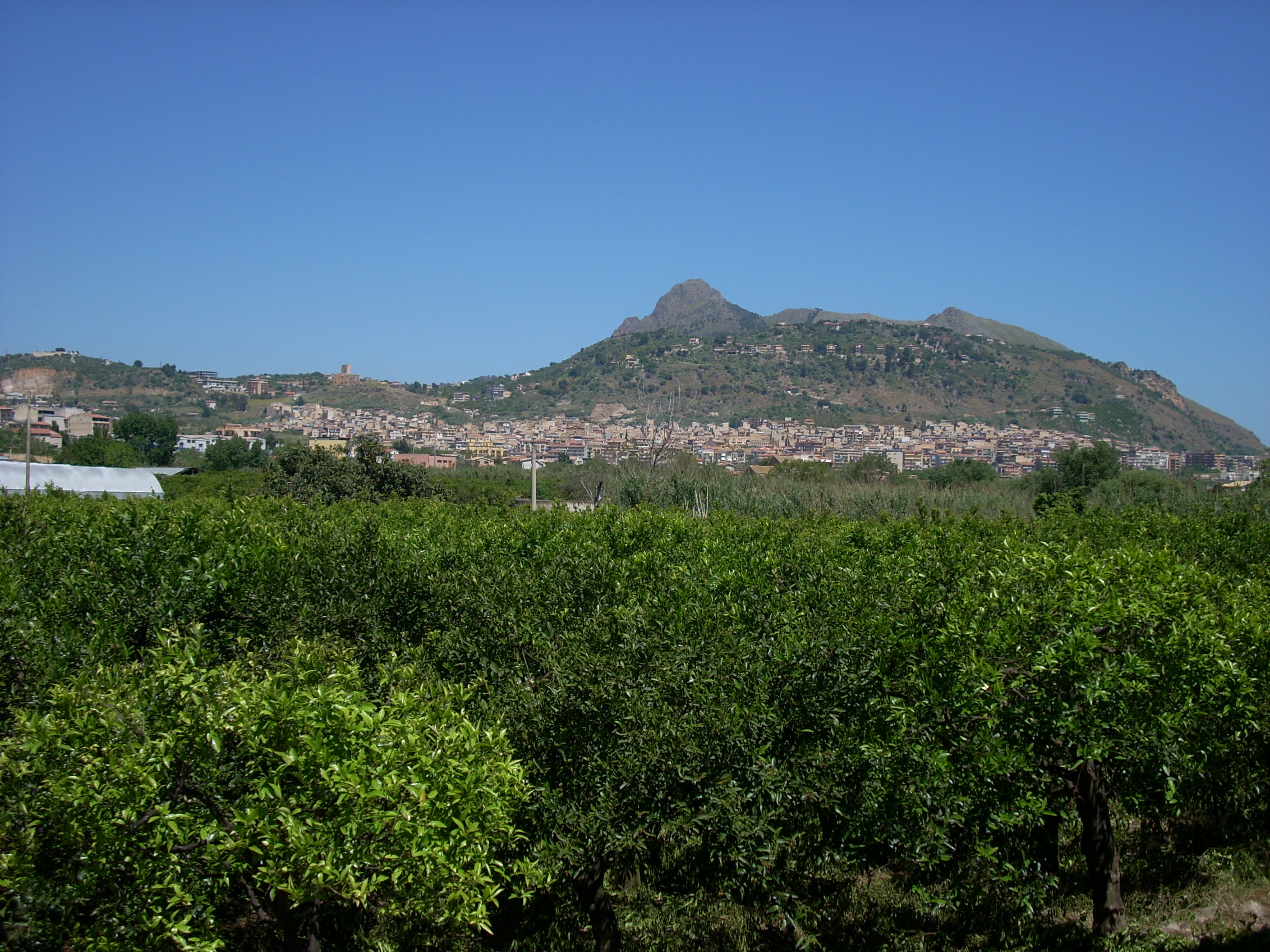 Panorama di Misilmeri. Agrumeti.